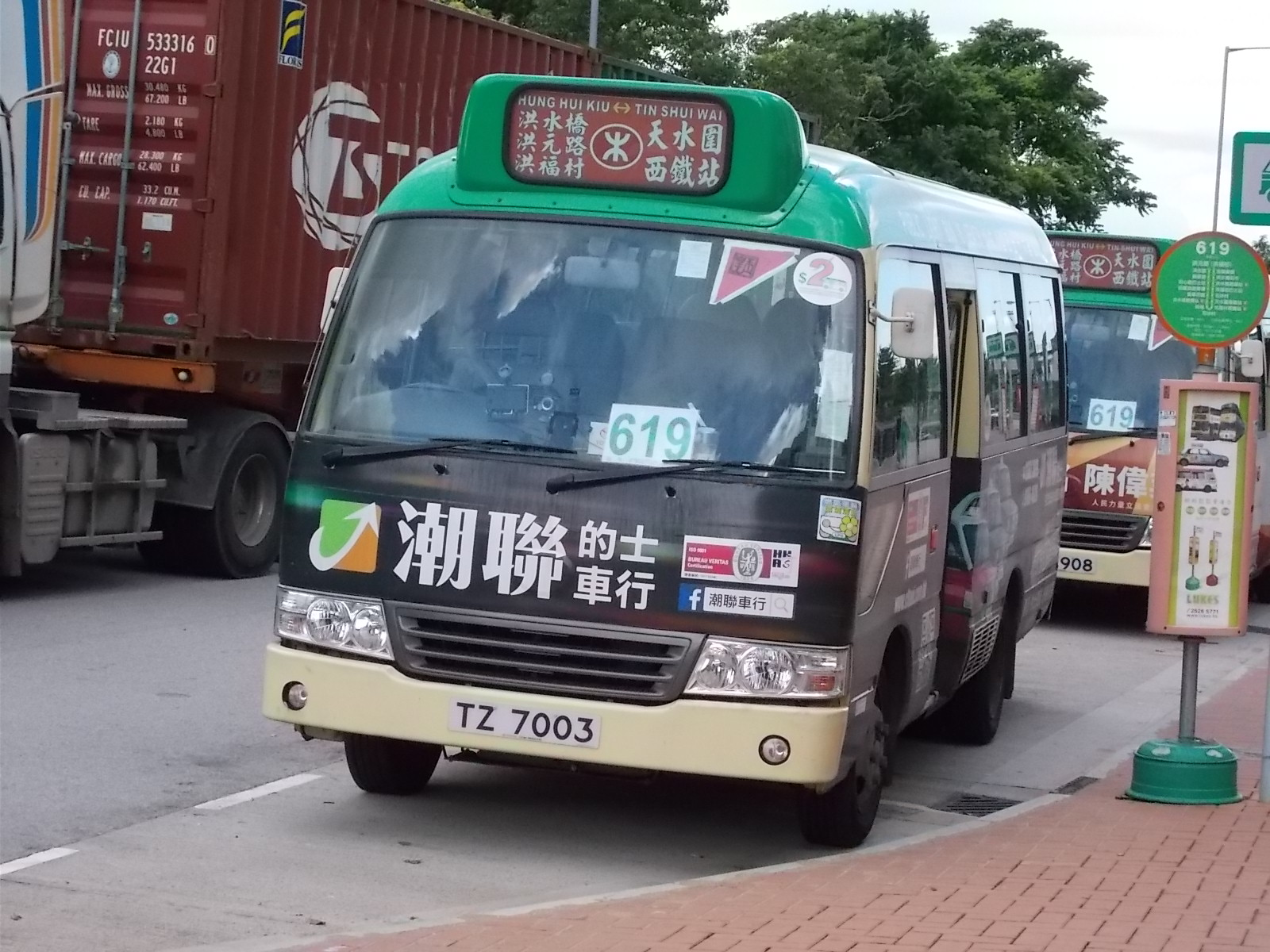 新界專線小巴619線，在洪水橋洪福邨等候開出